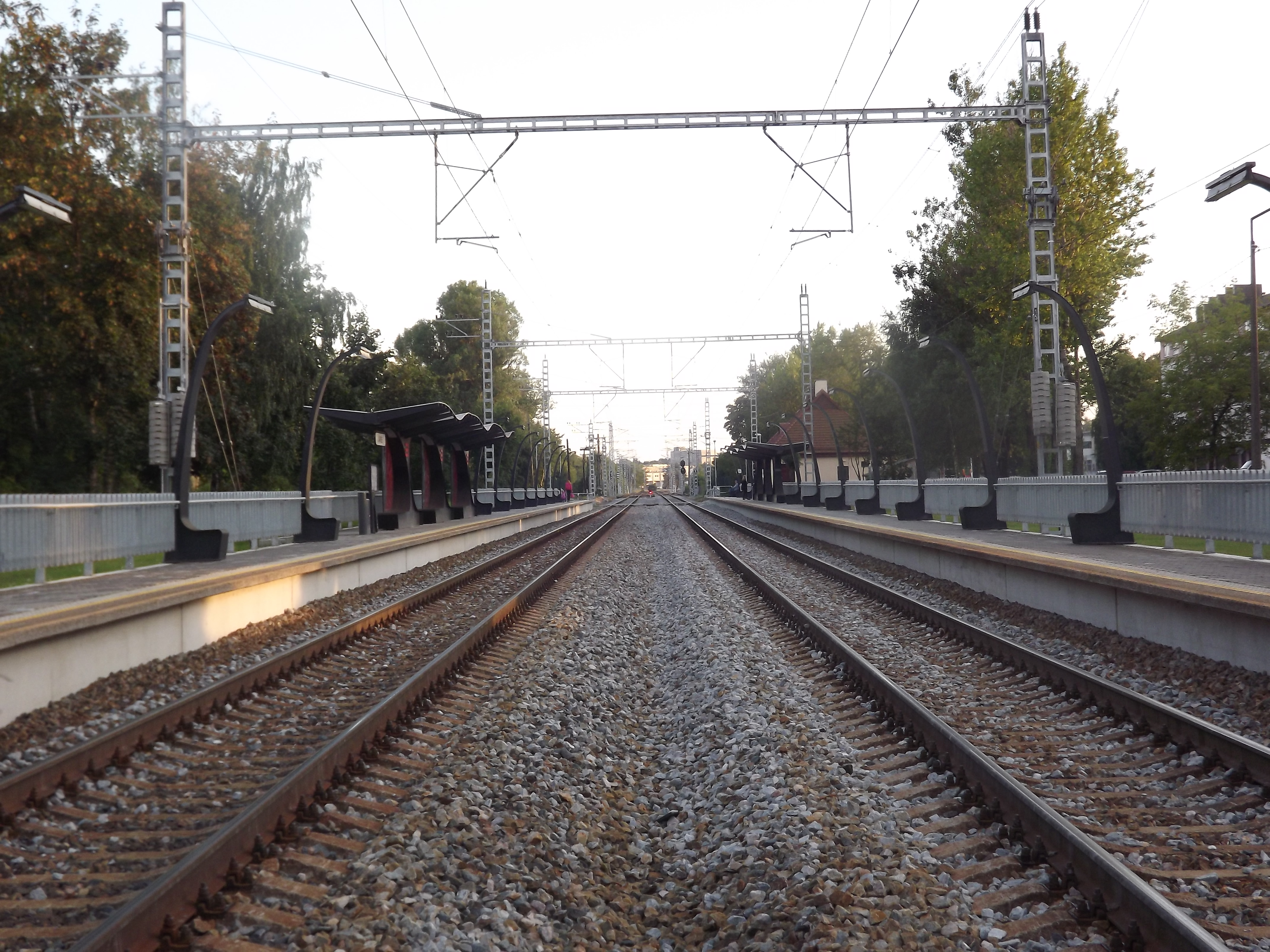 Järve raudteepeatus